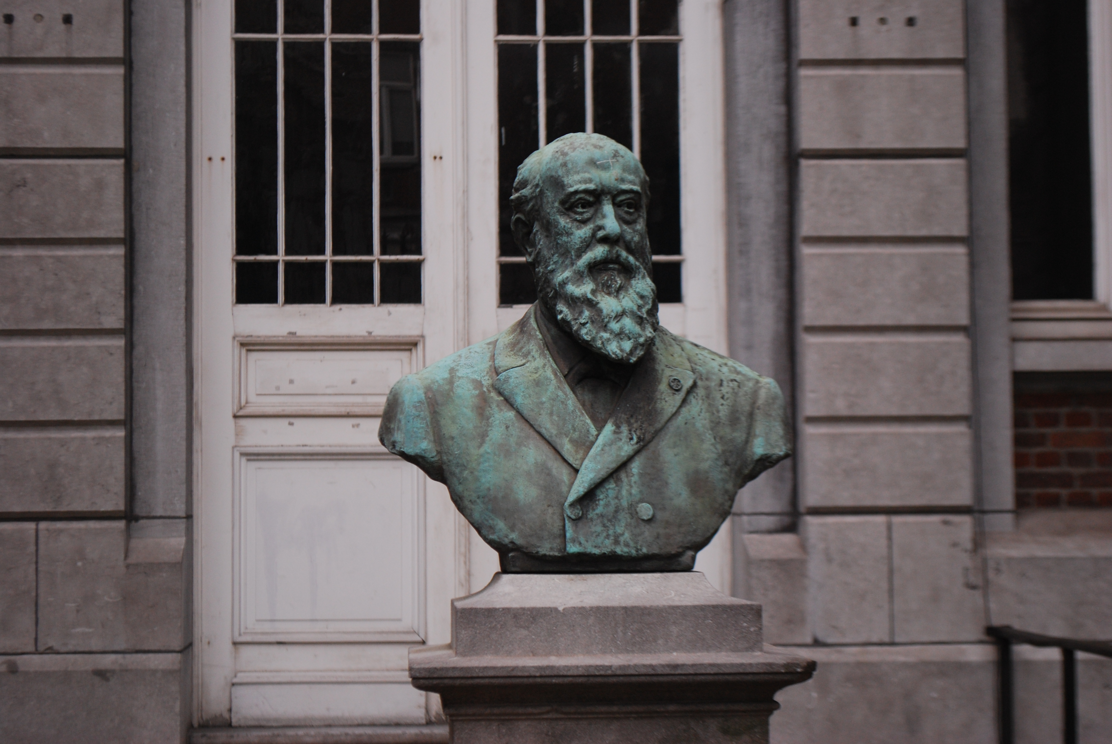 Buste de Zénobe Gramme, boulevard Saucy à Liège.